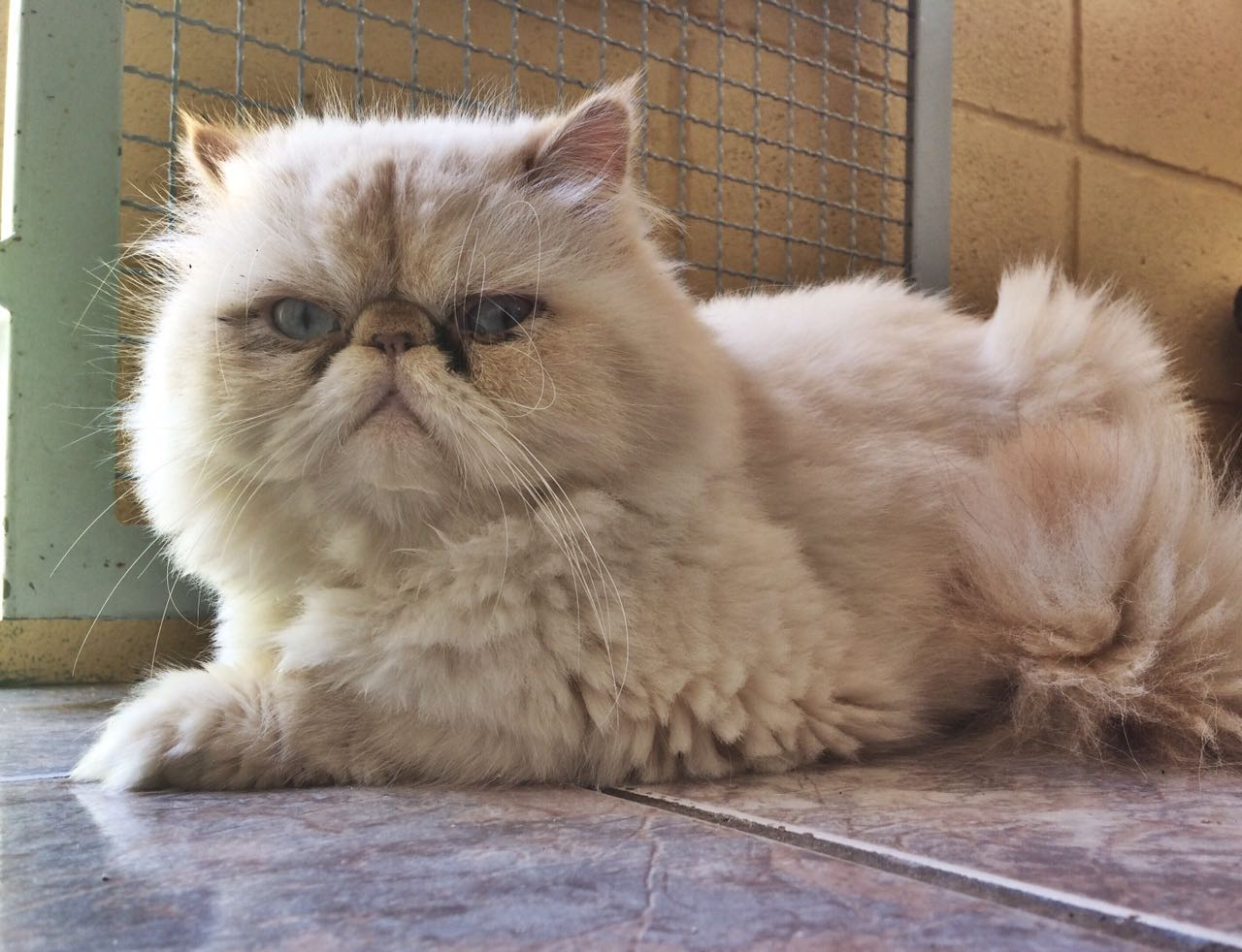 Gato Himalaio Pelagem: Red Lynx Point Idade: 4 anos